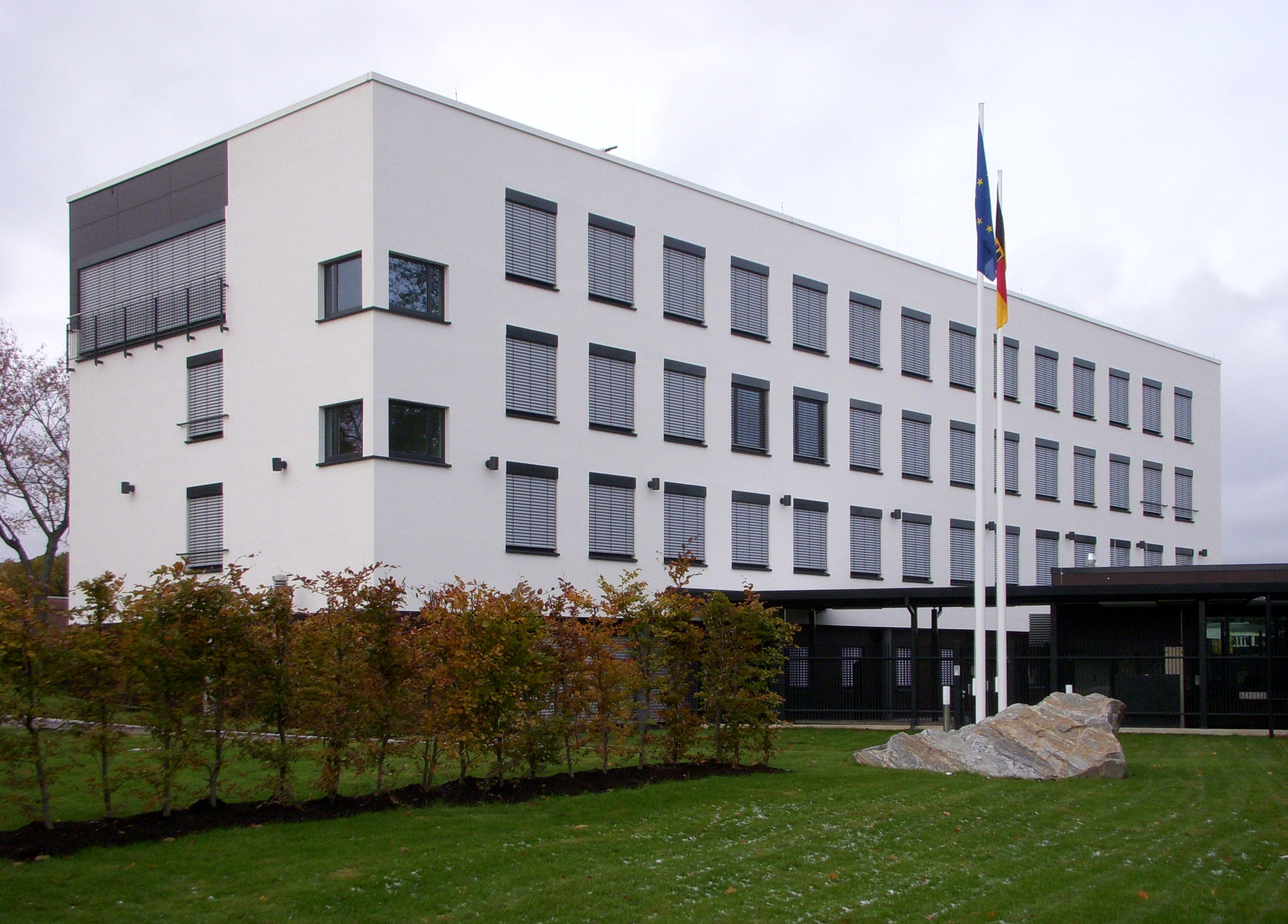 Tysklandsambassad i Stockholm